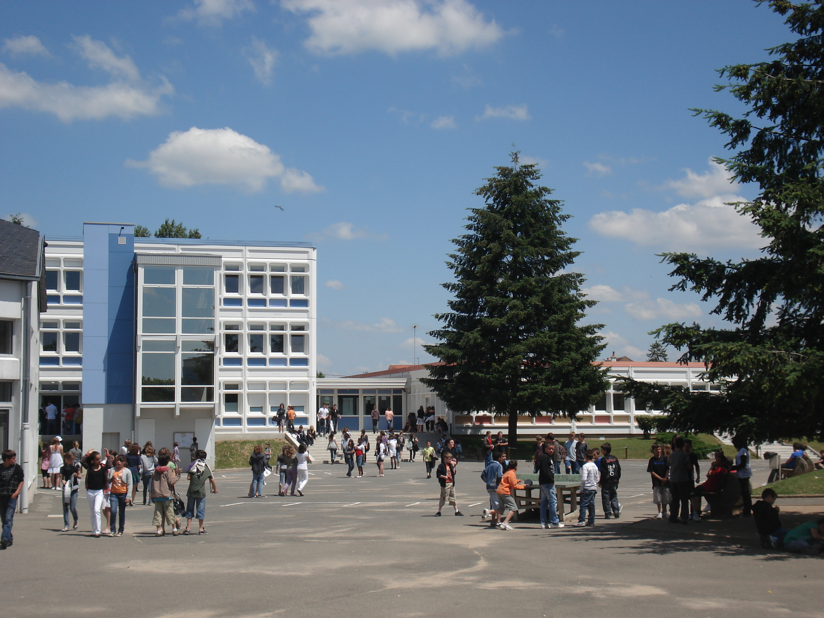 Cour du collège Blois-Vienne (juin 2009)